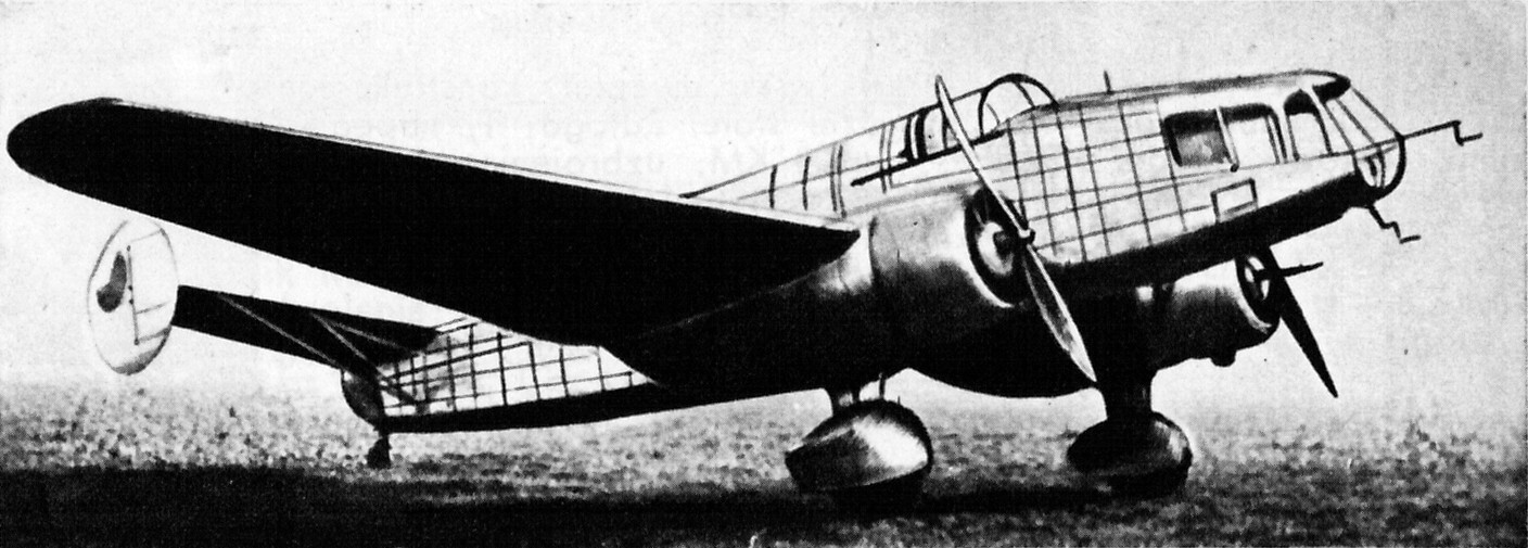 Czechosłowacki samolot rozpoznawczo-bombowy Letov Š-50.